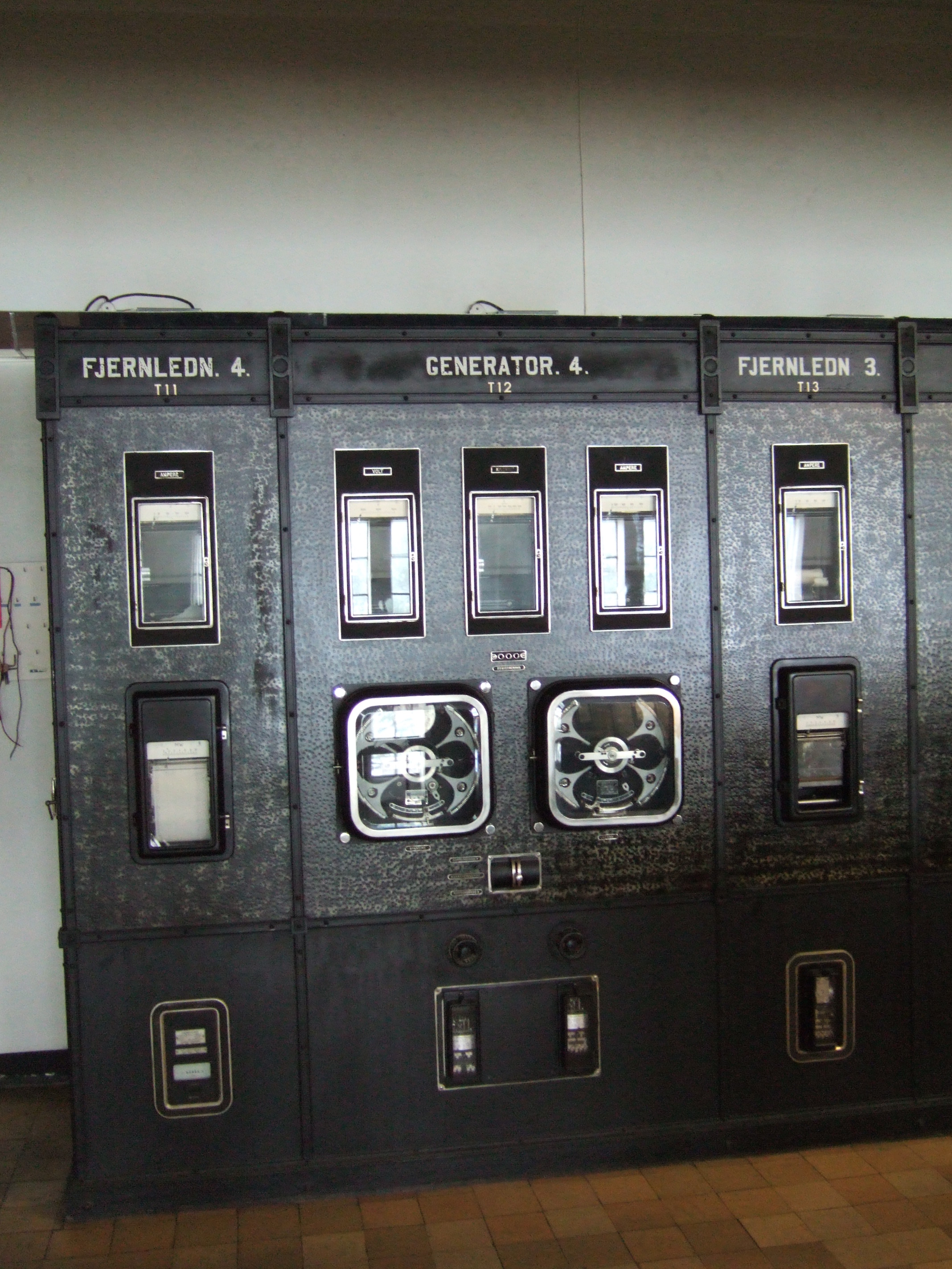 Old instruments and voltage regulator in Hakavik Power Station, Øvre Eiker. The two voltage regulators in the middle of the picture.